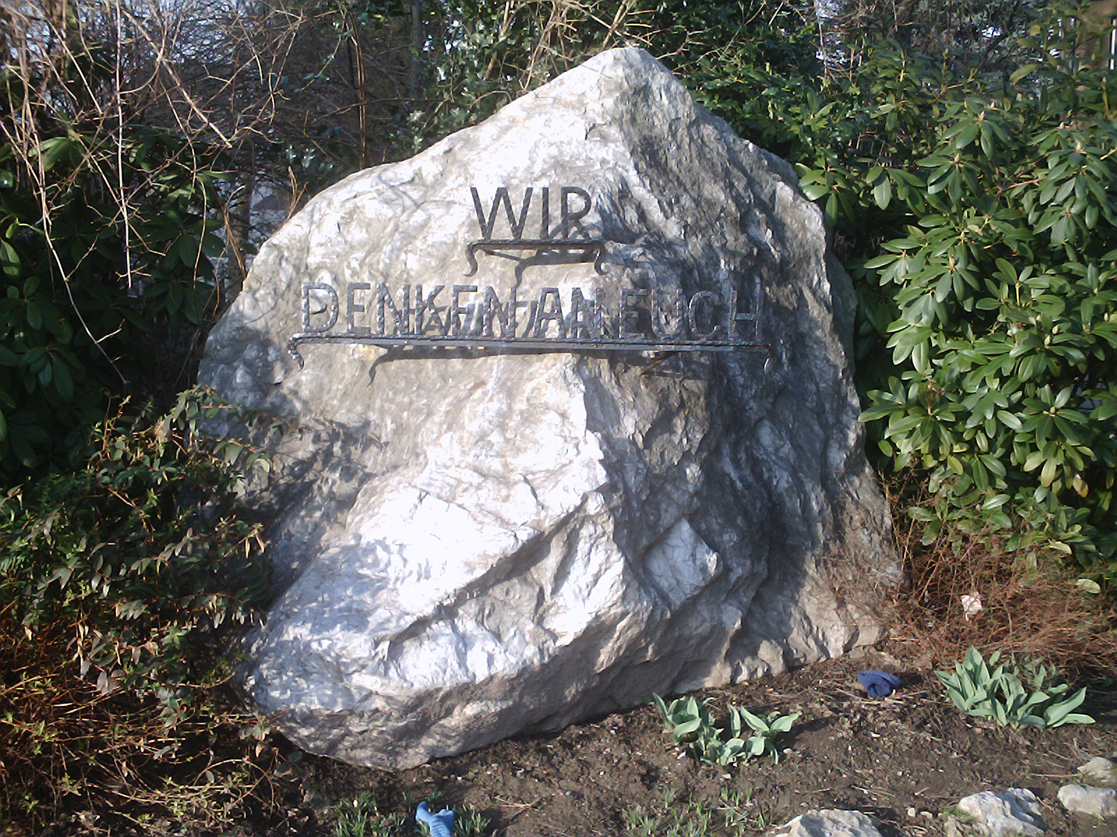 Denkmal